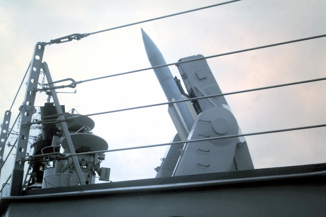 Missile Tartar prêt au lancement à bord de l'EE Kersaint